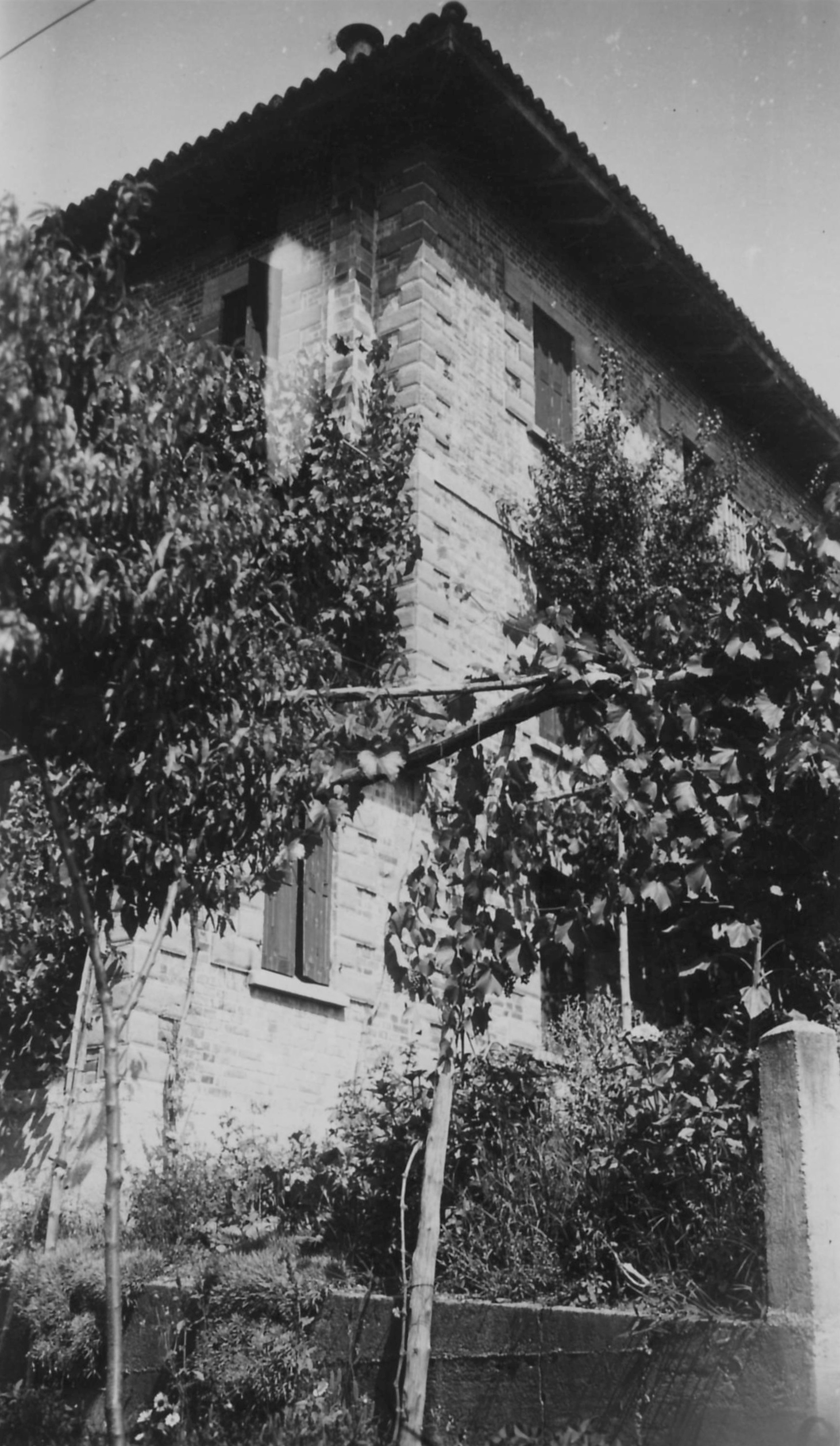 Una delle caratteristiche abitazioni del 1935 fotografata prima del sisma avvenuto il 6 maggio 1976. L'abitazione è di carattere storico e risulta una delle pochissime residenze che hanno resistito alla scossa. Successivamente ha subito il retrofit antisismico ed è stata modificata.